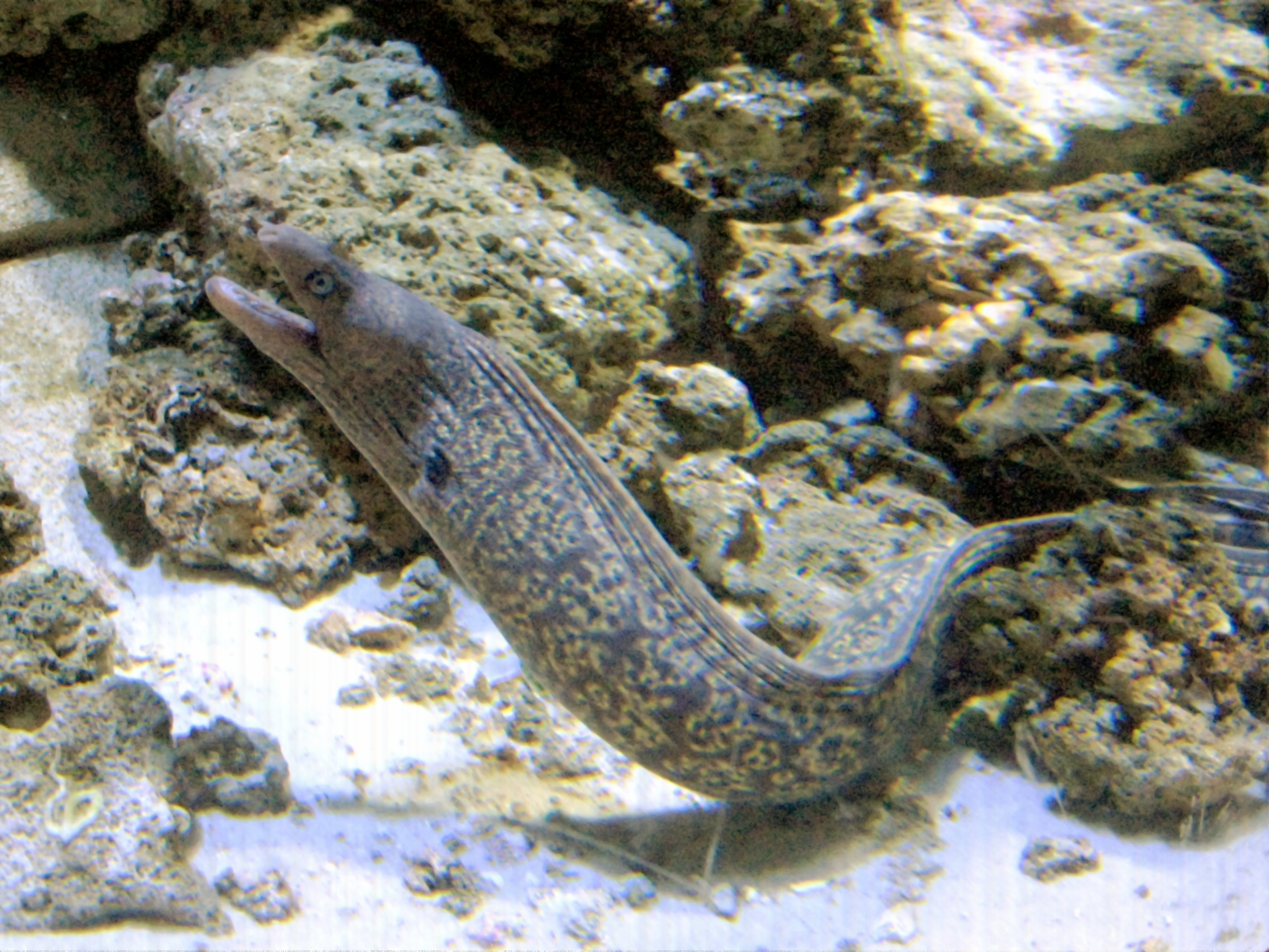 Muraena helena à l'aquarium Cinéaqua